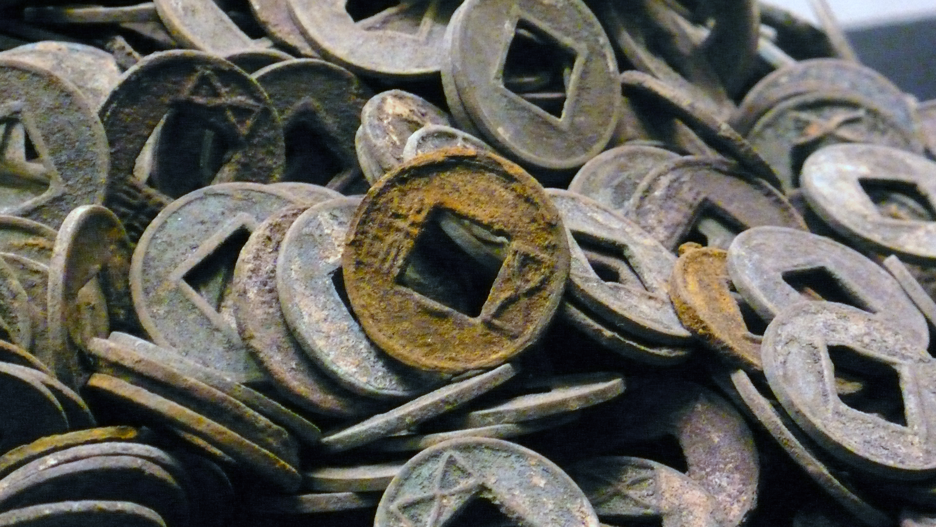 五铢钱。海昏侯国遗址出土。首都博物馆临展。